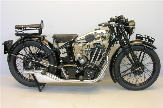 Triumph_NT_500_cc_1933.jpg